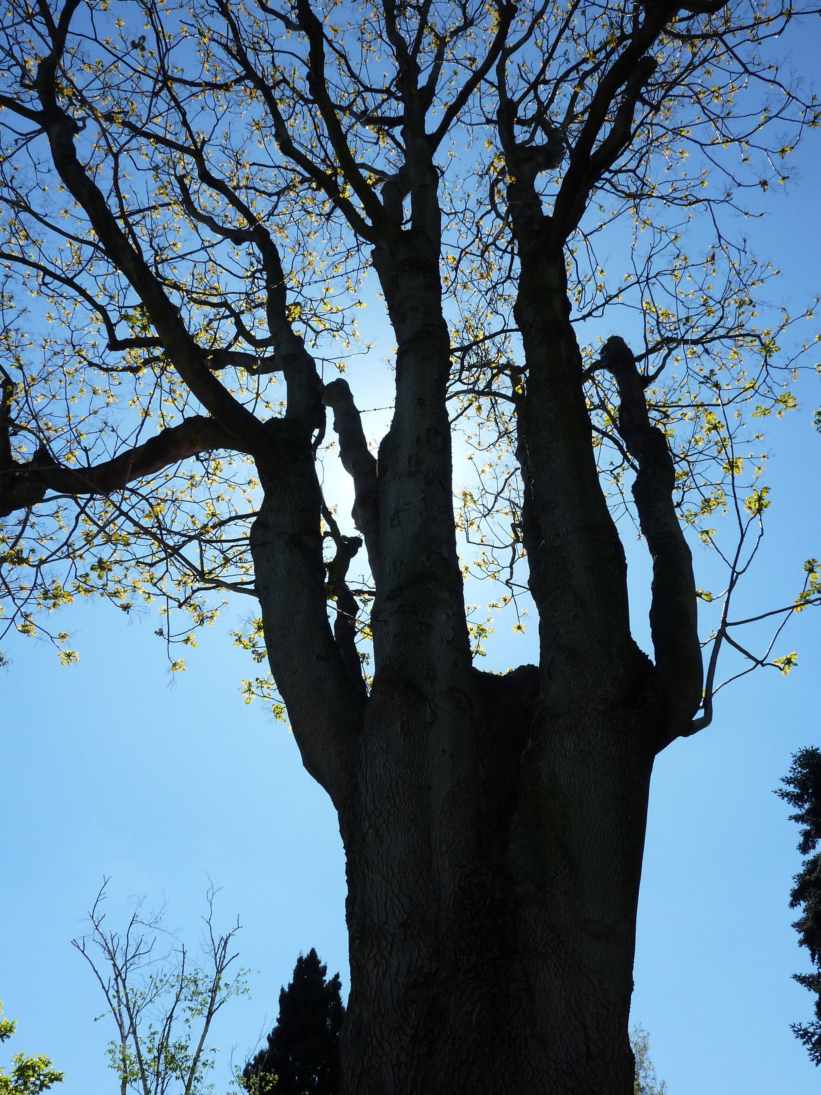 Ailanthus giraldii. Tronc d'un vieux spécimen au printemps - Jardin botanique de la ville de Paris - France